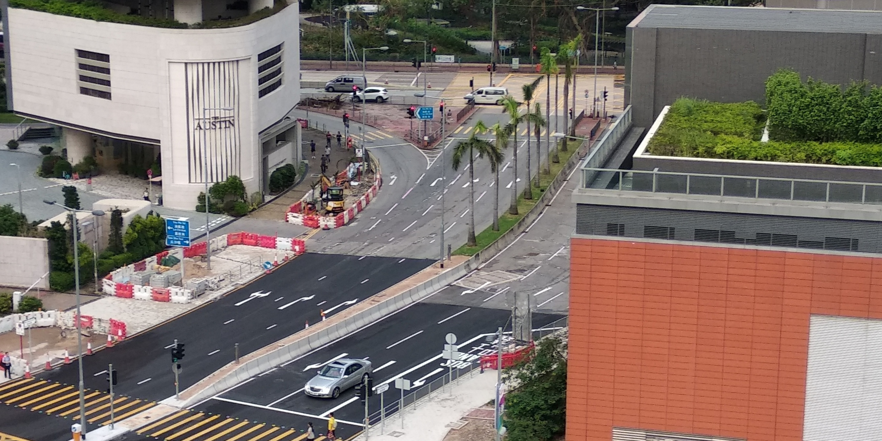 中文（香港）: 香港西九龍站工程完成後殘存的整段匯翔道。